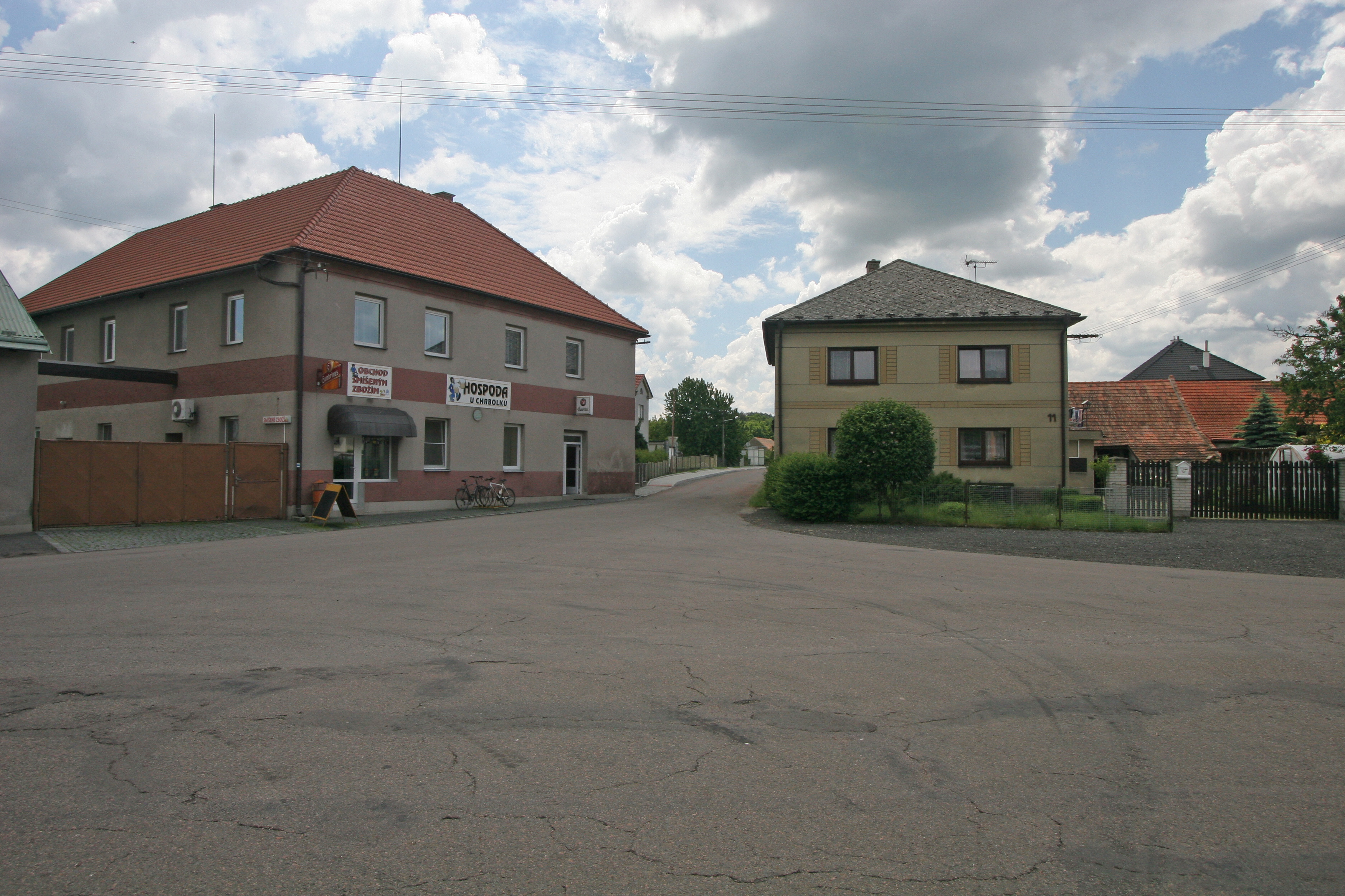 Svídnice hospoda